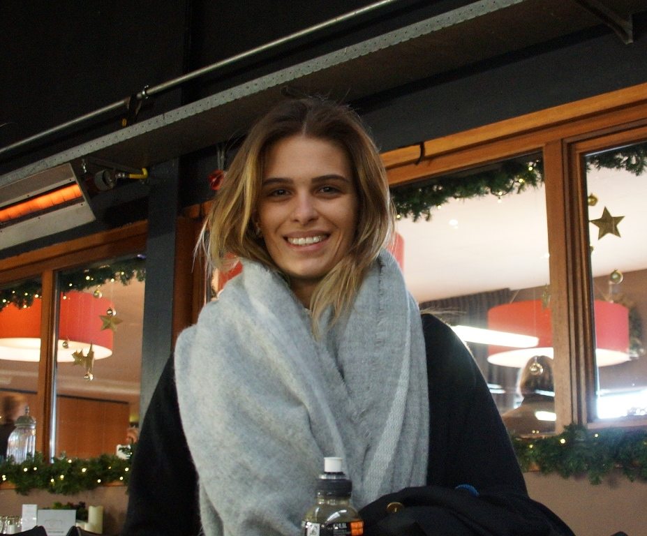 Luiza Tavares de Almeida